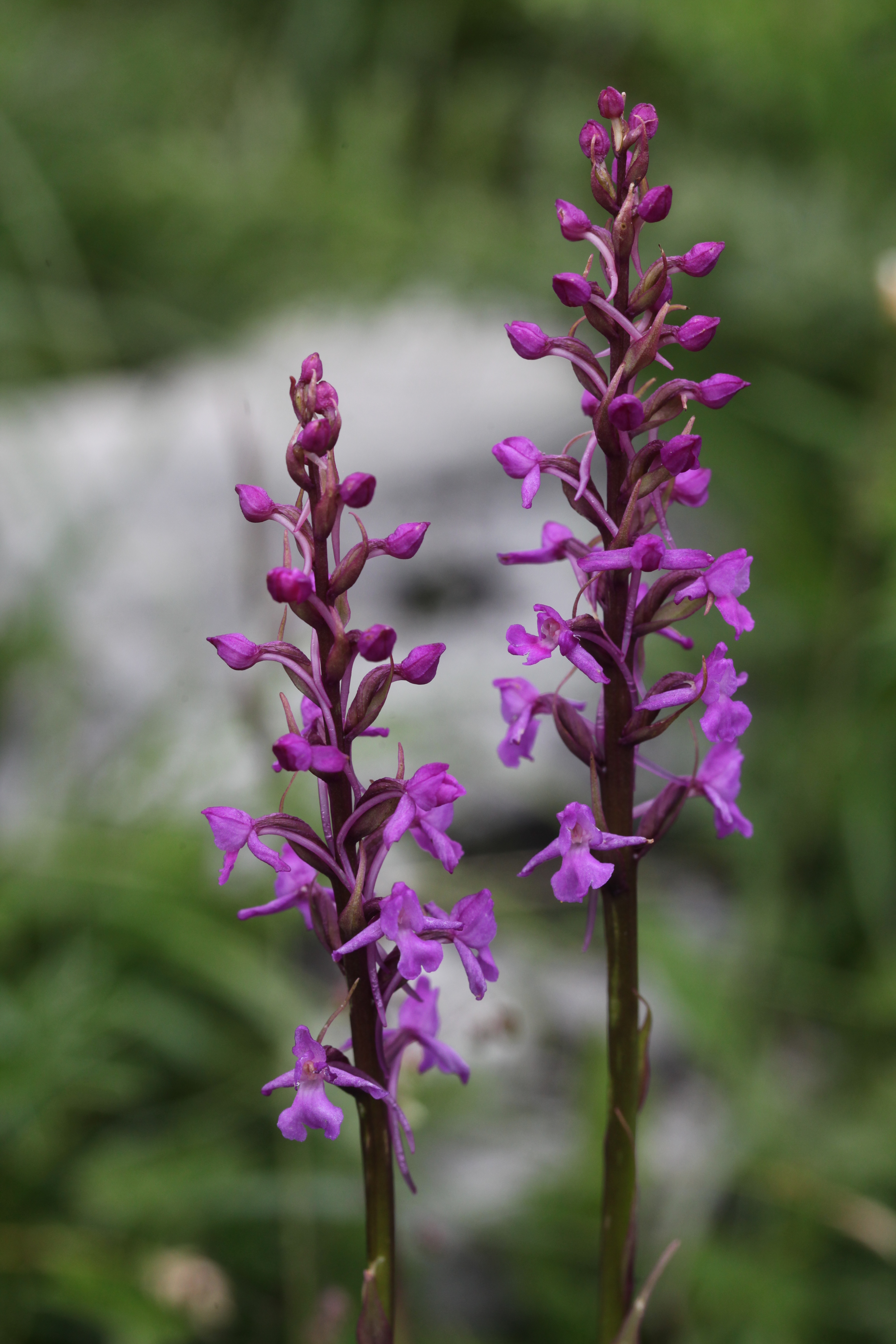 Orchis moucheron (Gymnadenia conopsea) au Creux du Van.